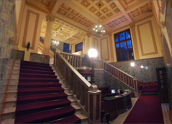 Interior do Museu de Arte do Rio Grande do Sul, Porto Alegre, Brasil. Saguão com efeito fish-eye